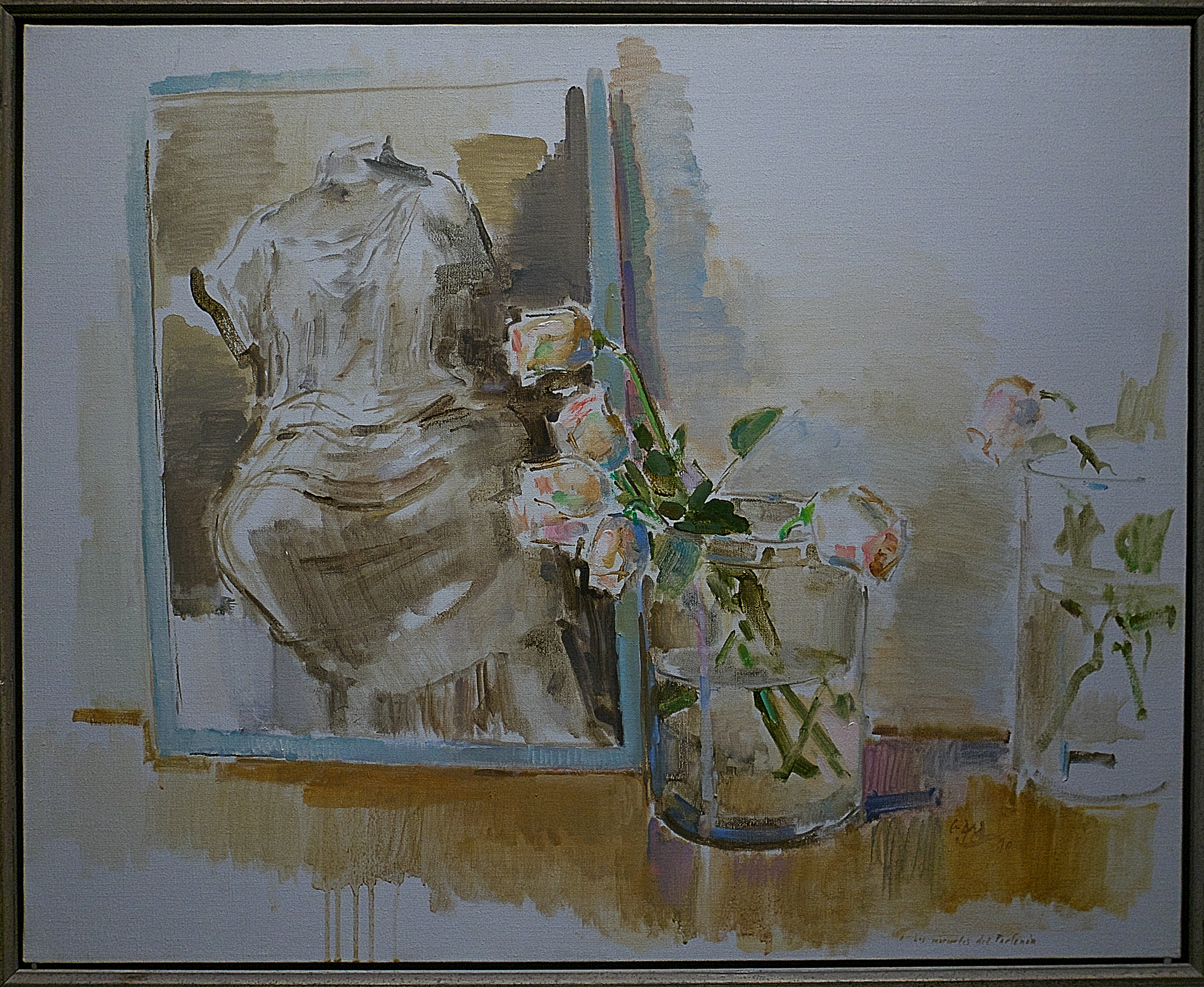 Fundación CajaSol. Óleo sobre lienzo de Ramón Gaya Pomés